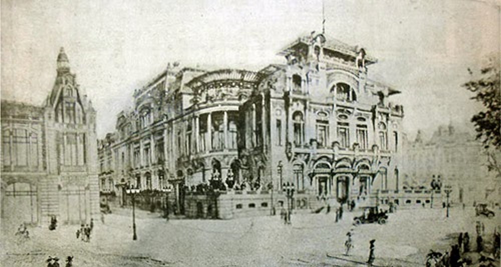 Proyecto ganador del concurso para el edificio del Club de la Unión, Santiago de Chile , obra del arquitecto francés Henri Grossin, 1912.